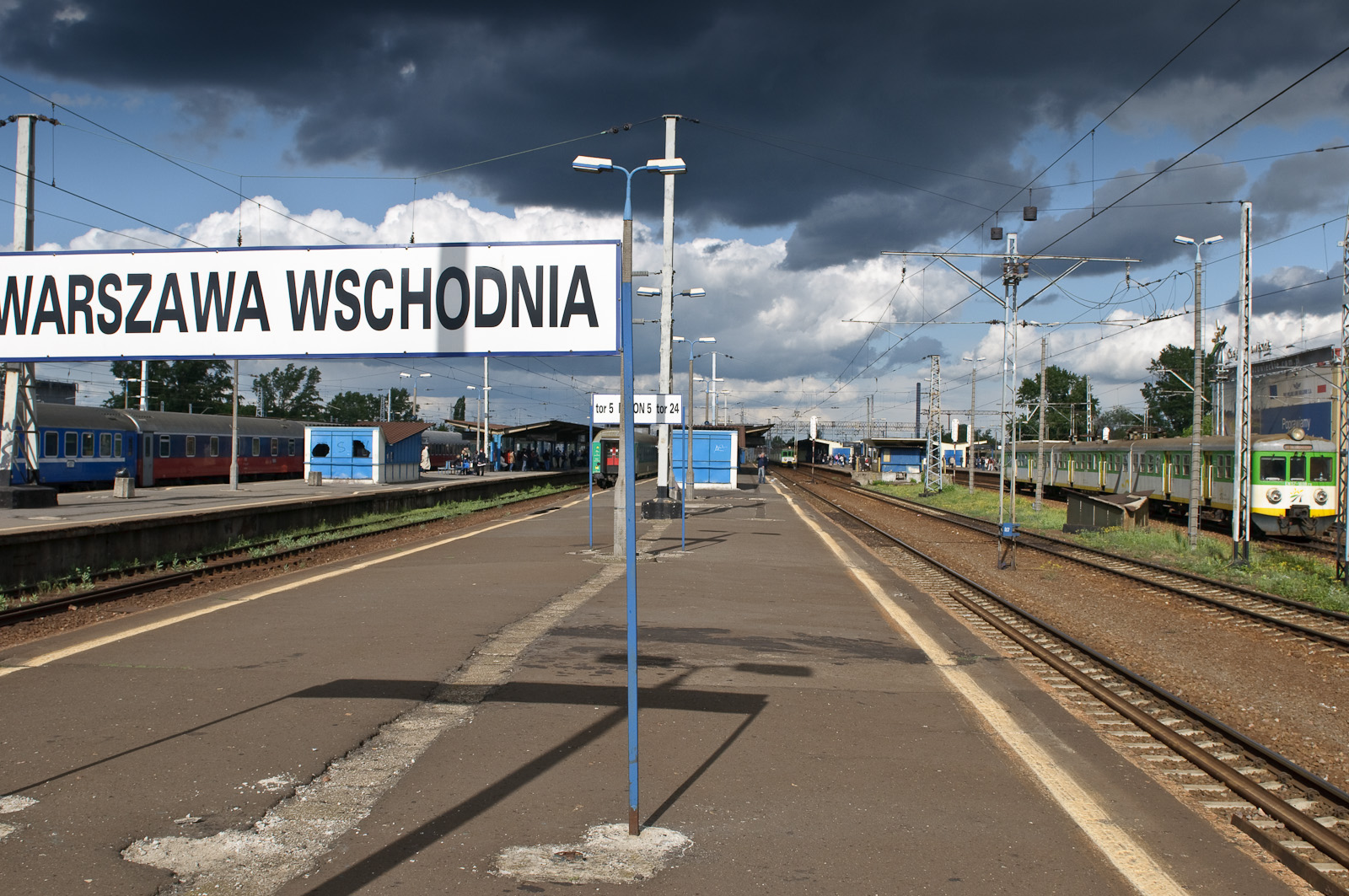 Peron stacji Warszawa Wschodnia.